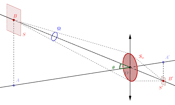 Illustration photométrique d'une lentille